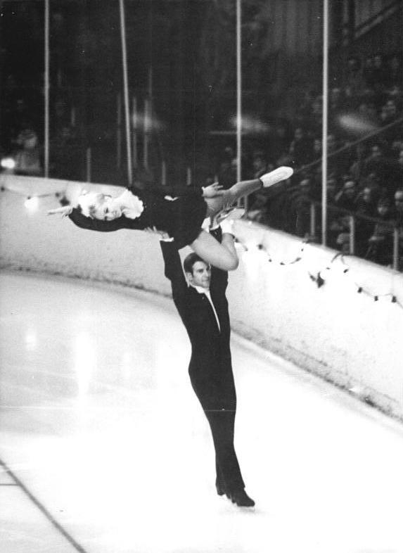 Heidemarie Steiner, Hans-Ulrich Walther Zentralbild Wendorf-26.12.1969 Berlin: Eislaufrevue der "Polarsterne" des SC Dynamo im Sportforum. Heidemarie Steiner - Hans-Ulrich Walther bei ihrem Vortrag.